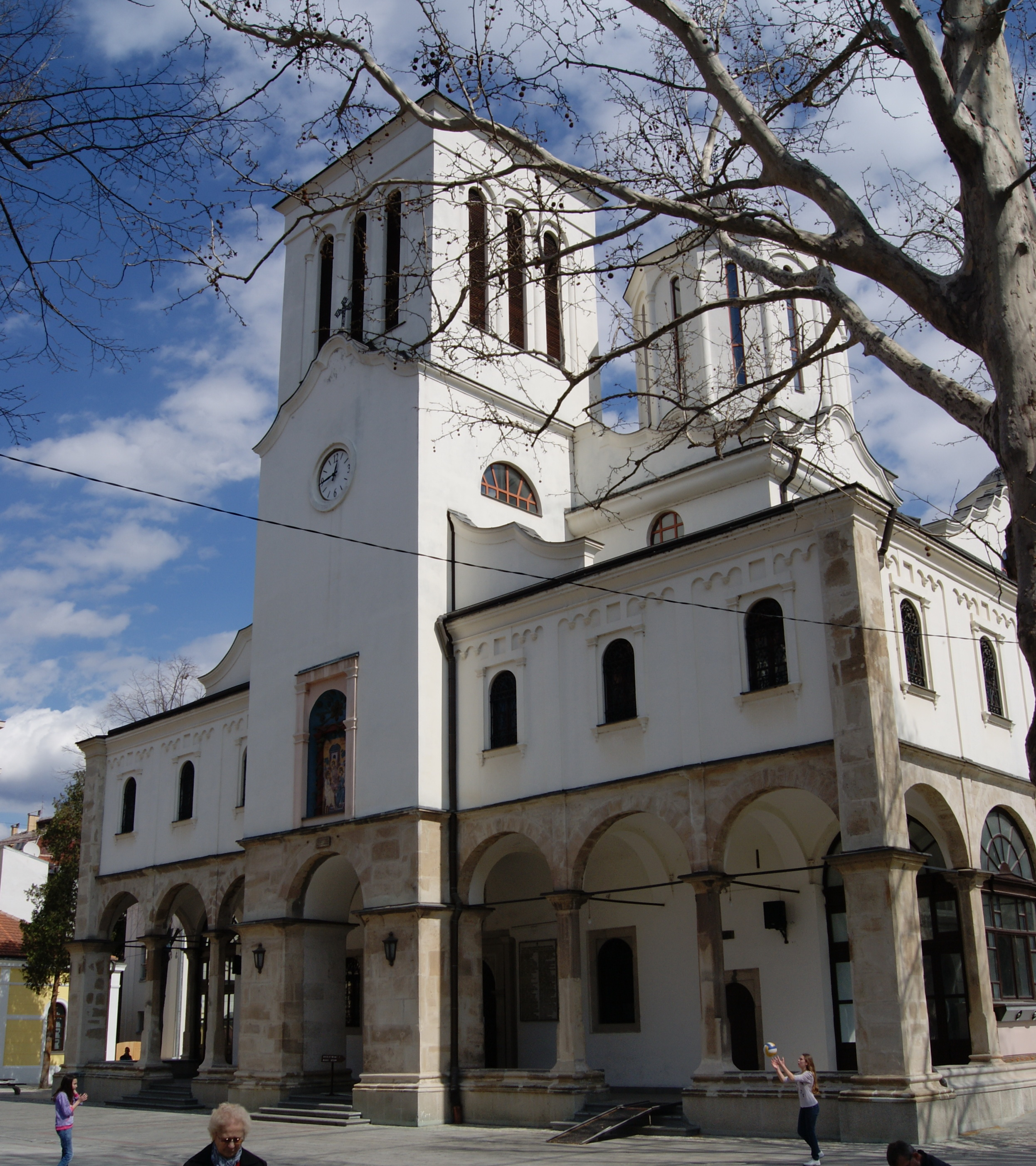 Saborna crkva u Nišu, april 2012.